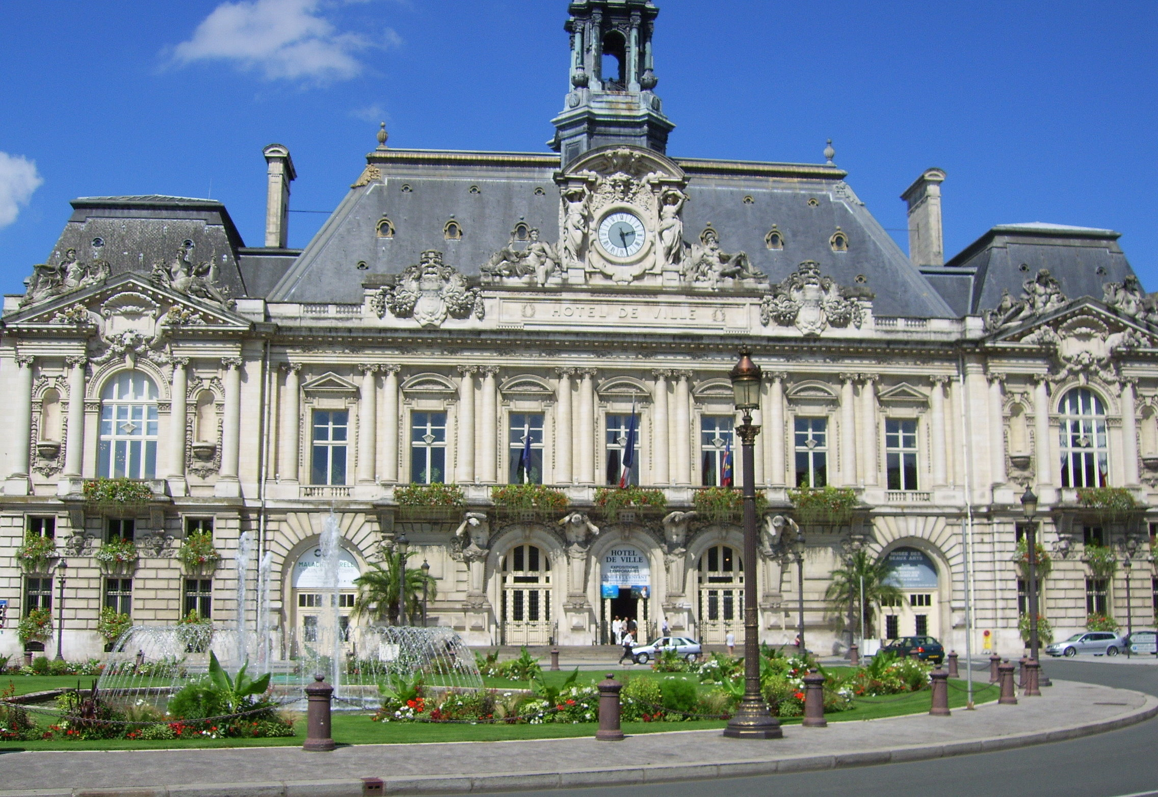 Rathaus von Tours